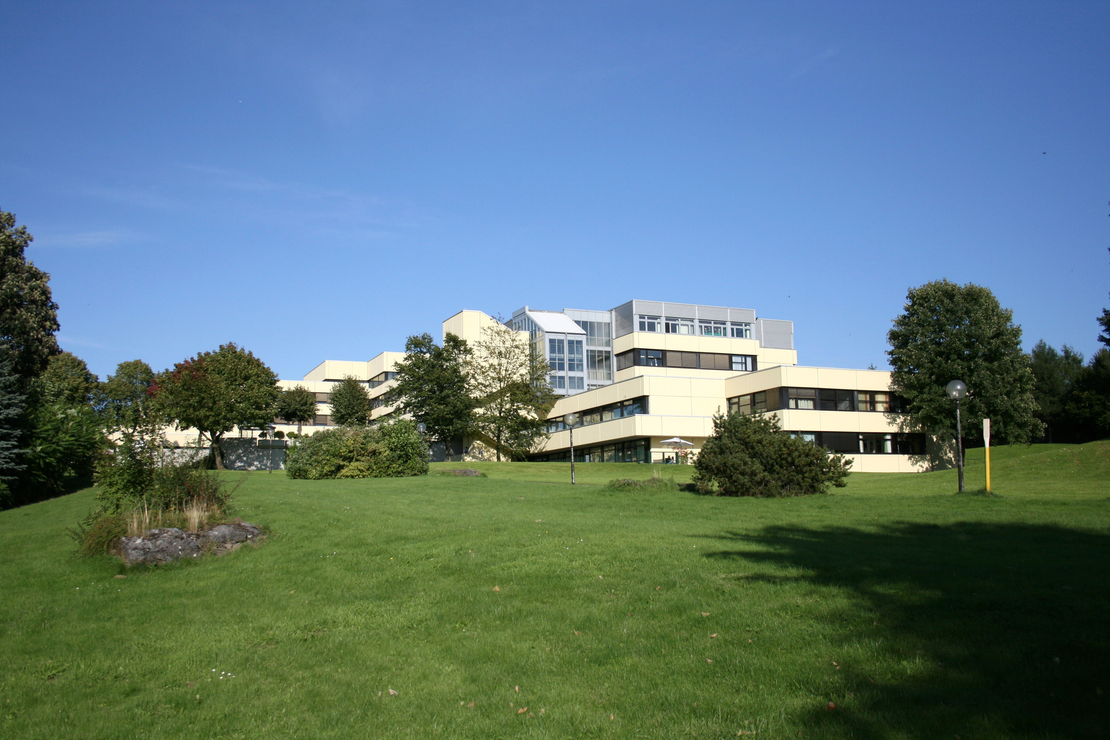 Helios Klinikum Schwelm auf dem Martfeld in Schwelm